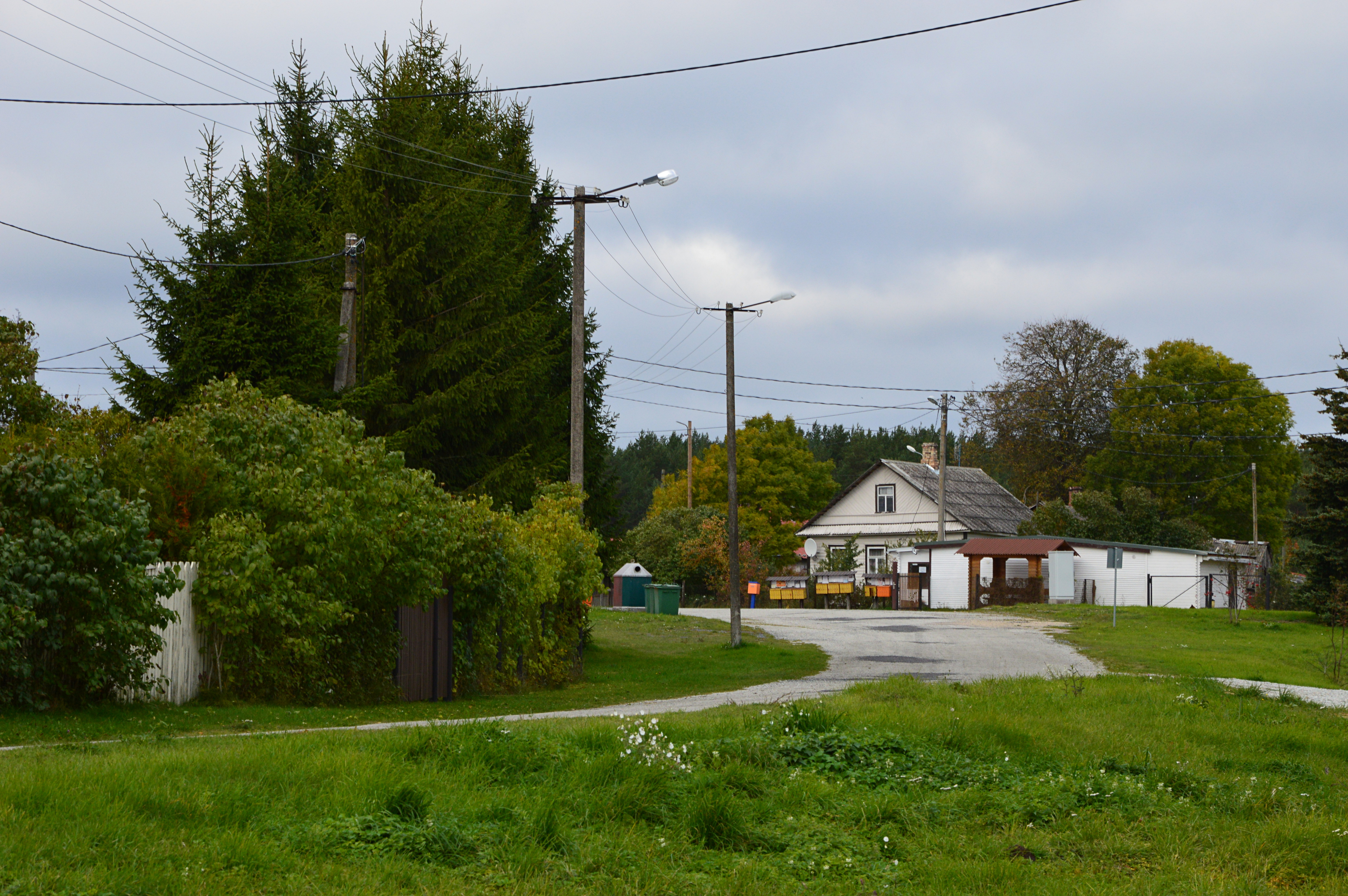 Alajõe küla.